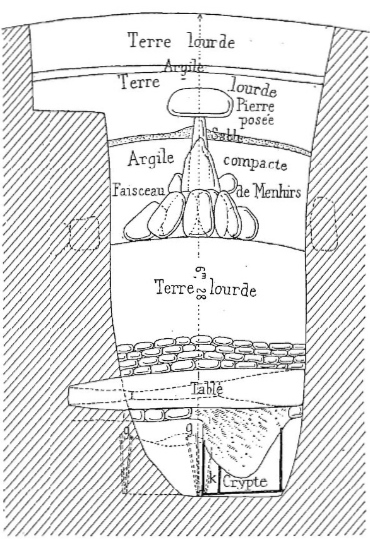 Coupe du tumulus du Cruguel en Guidel (L. Le Pontois, "Exploration du tumulus de Cruguel à Guidel, (Morbihan)", revue " L'Anthropologie", 1891)